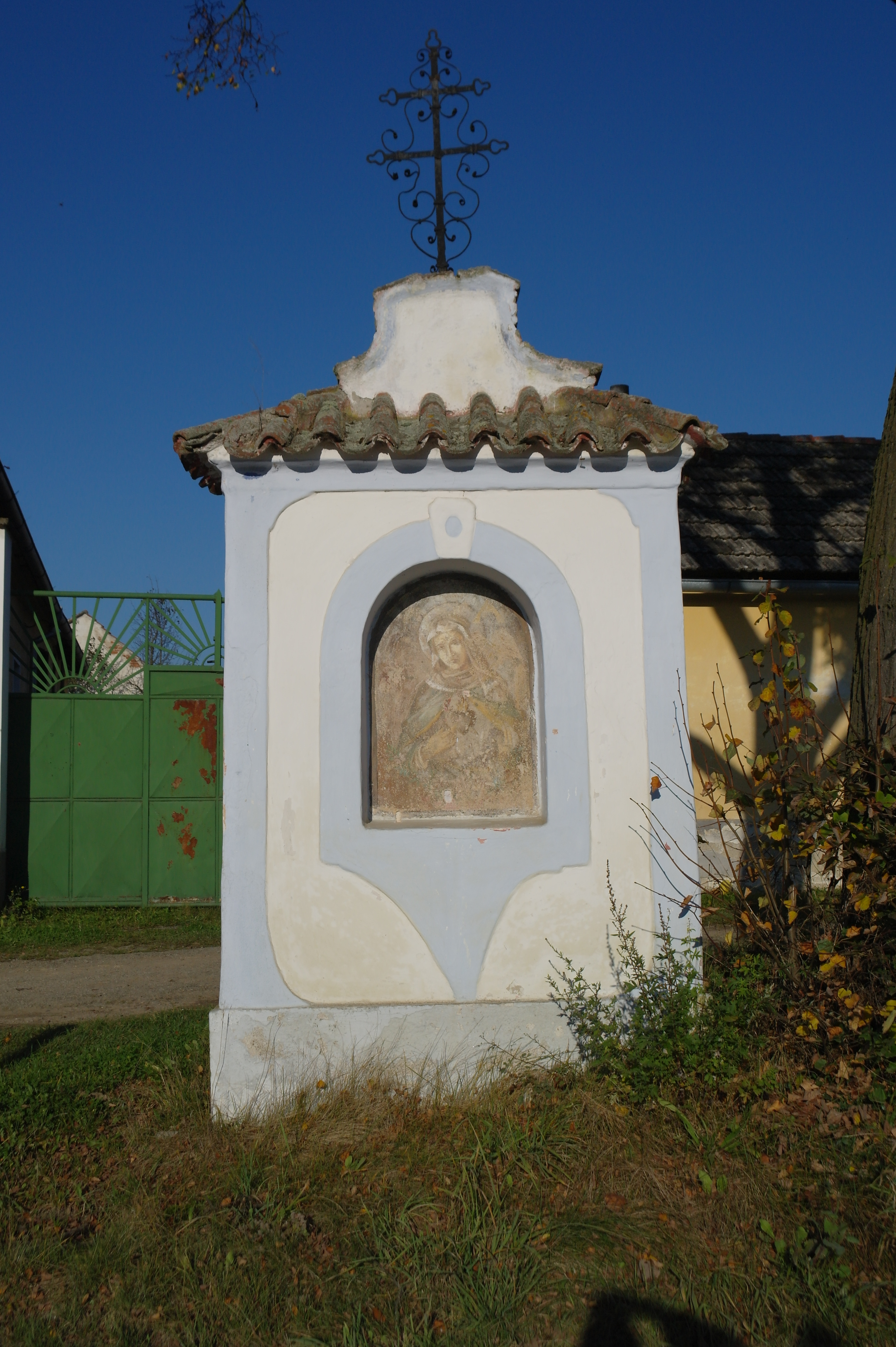 Výklenková kaplička Panny Marie z jihu, jižní okraj obce při silnici do Dubu, Javornice (Dub).